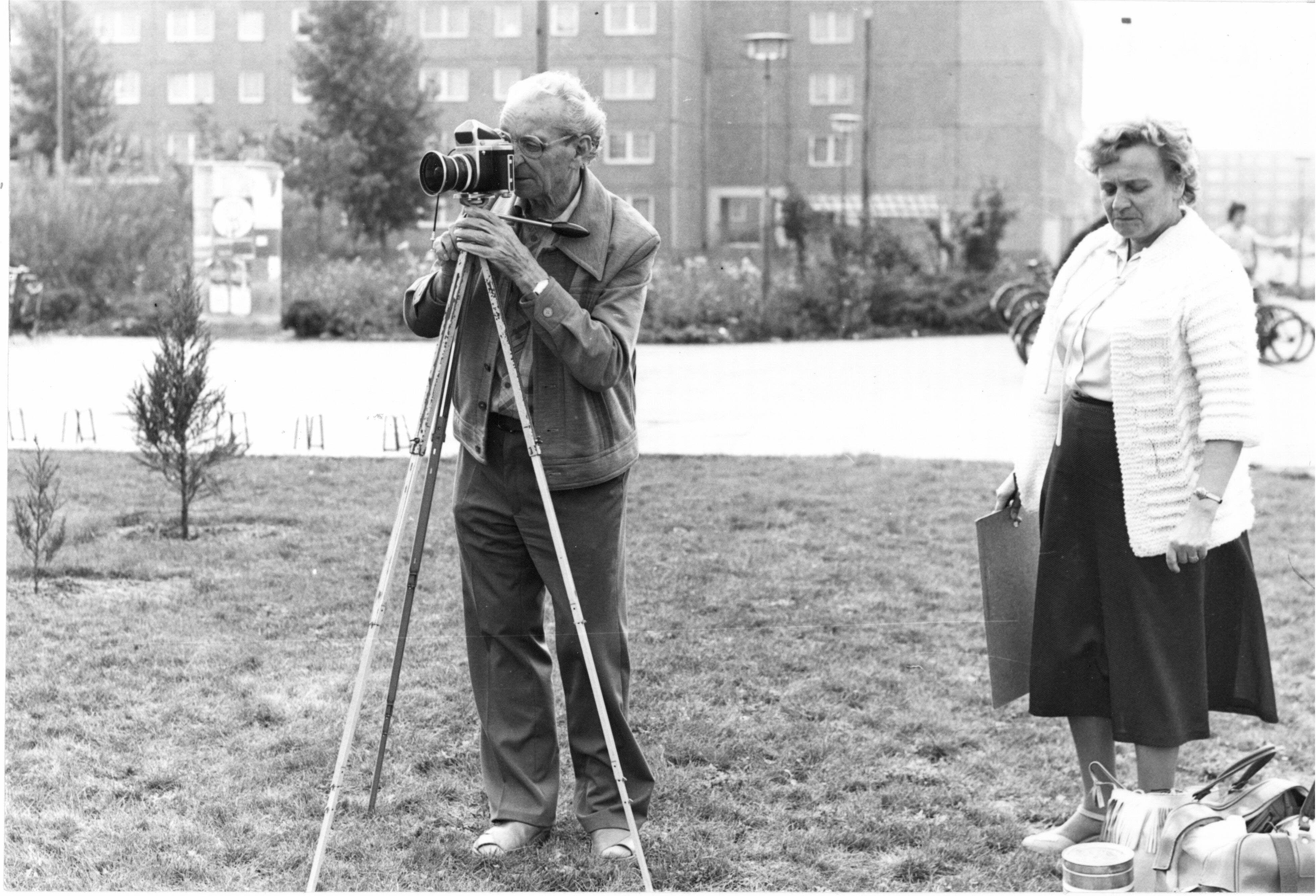 Werner Danz und Christine Lundershausen in Halle (Saale)